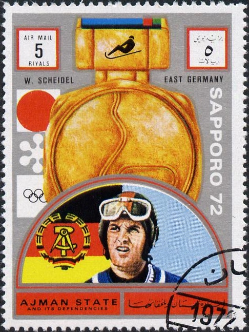 Wolfgang Scheidel